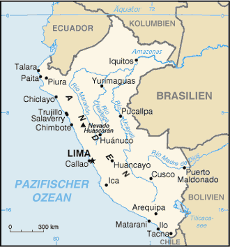 Karte von Peru